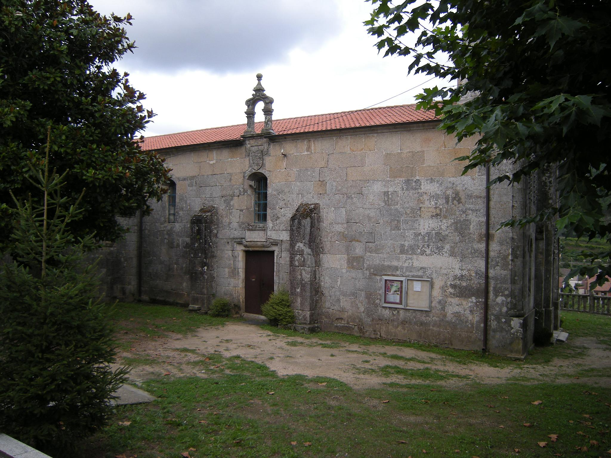 Igrexa de Santa Baia de Mos, Mos